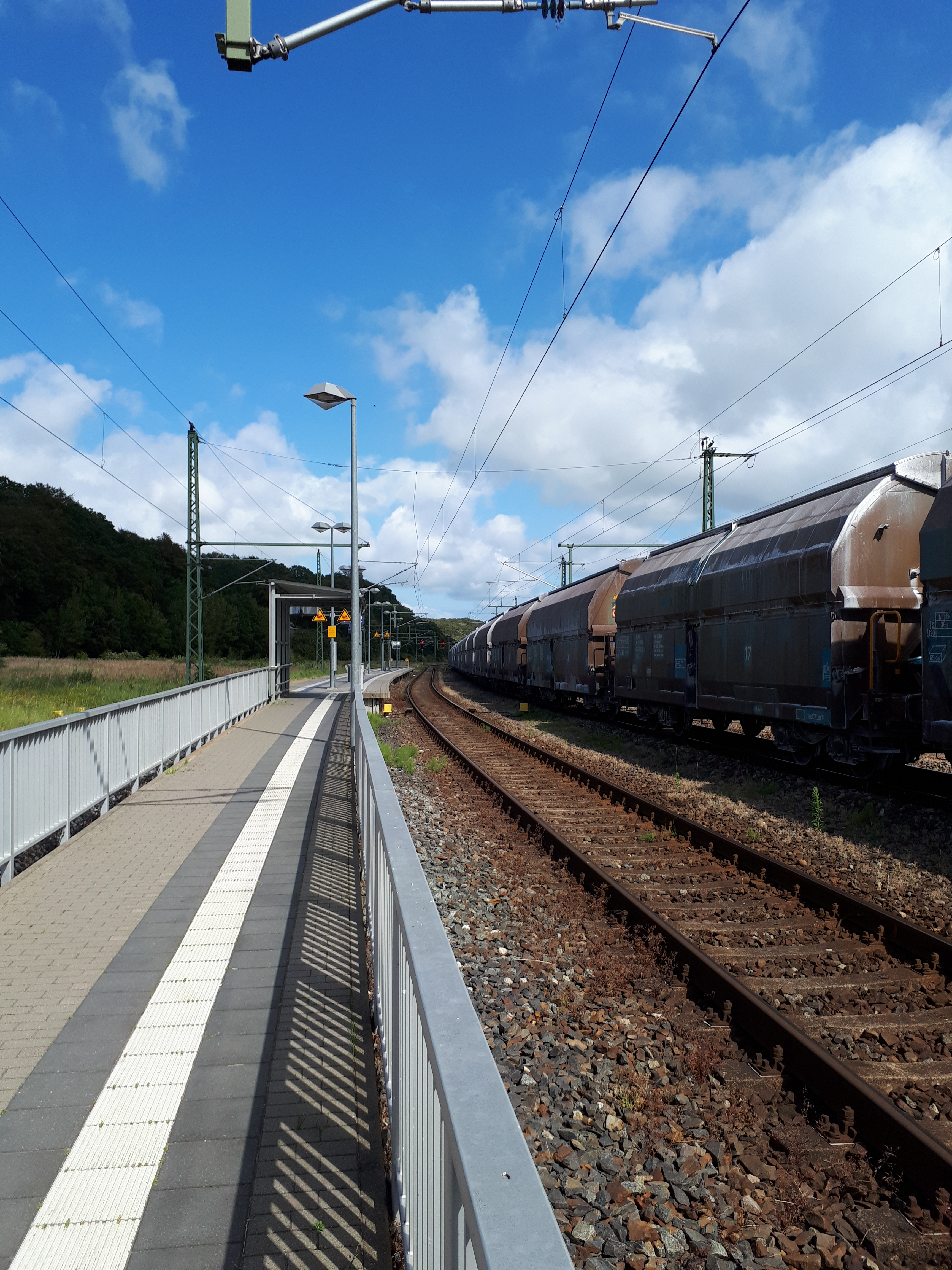 Bahnhof Lietzow (Rügen) 2019